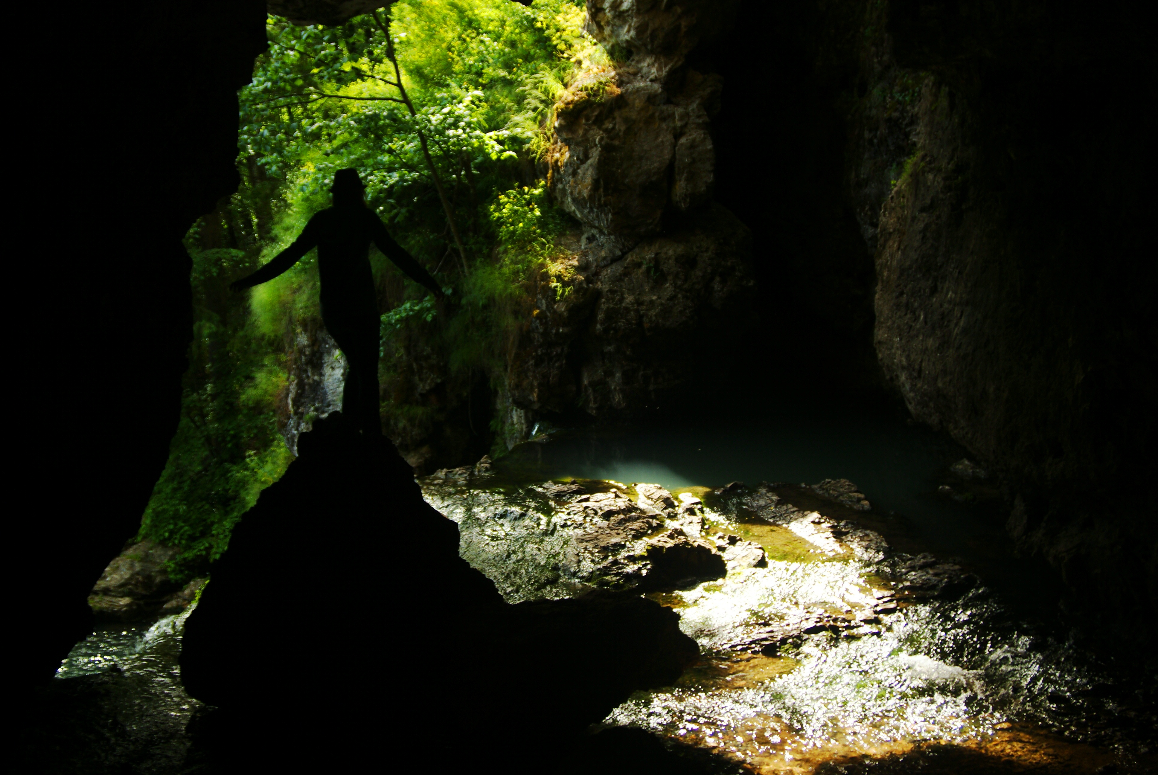 Внутри пещеры, из которой вытекает водопад Атыш. This image is related to the protected area of Russia number 0210057